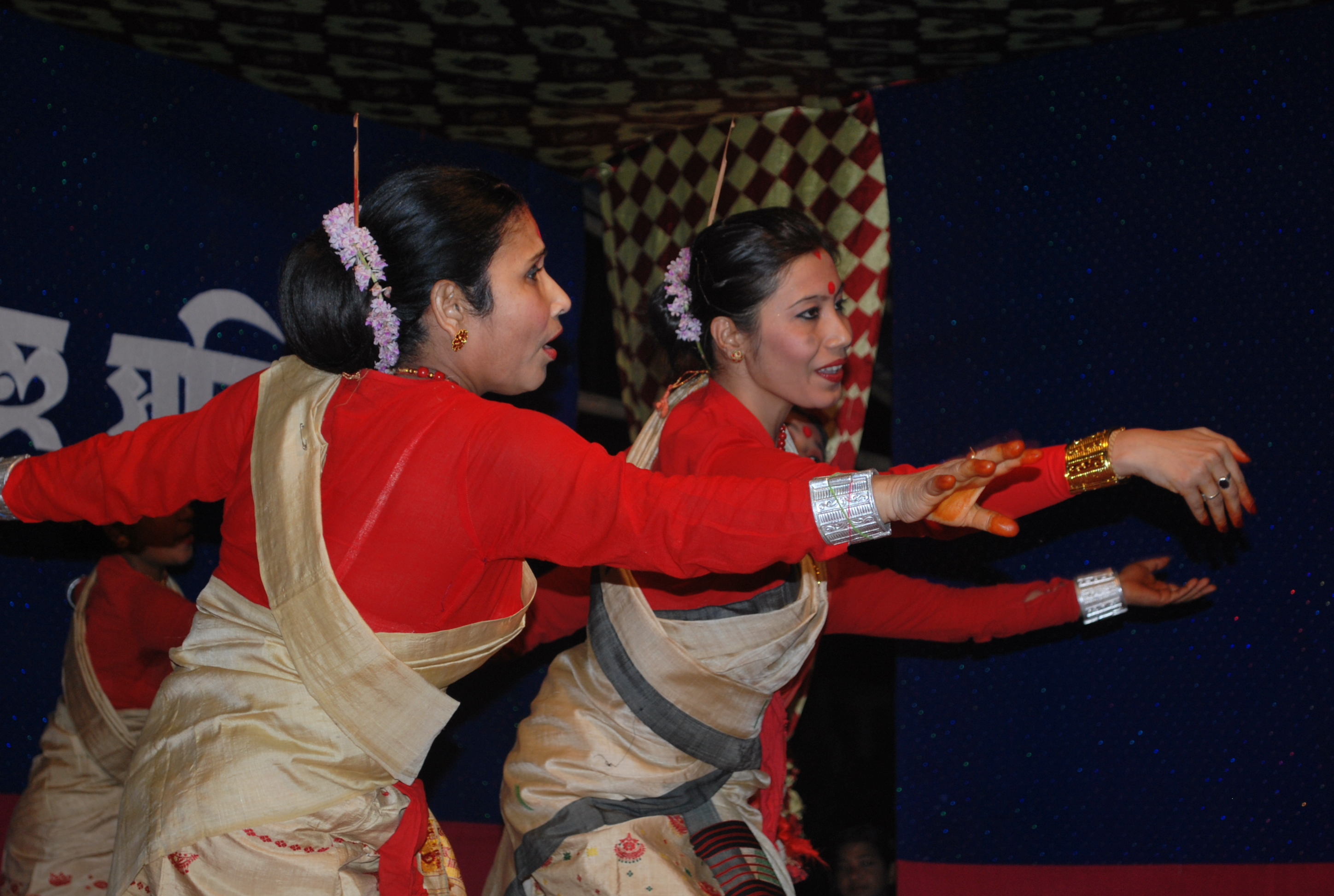 অসমীয়া: বৰ্তমান বহুল জনপ্ৰিয়তা অৰ্জন কৰা 'মঞ্চ বিহু' প্ৰদৰ্শন কৰি থকা অৱস্থাত দুজনী নাচনী।